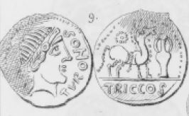 Monnaie gauloise trouvée sur le site des Châteliers